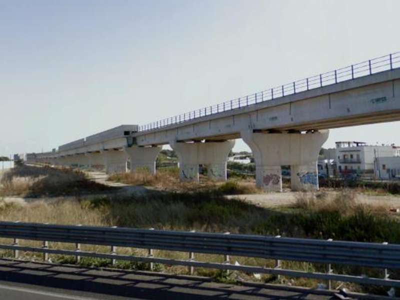 Viadotto in costruzione della ferrovia locale Bari - Bitritto - Il viadotto presso Lamasinata